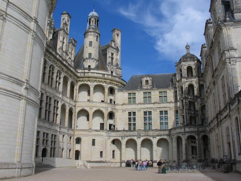 Chateau du Chambord